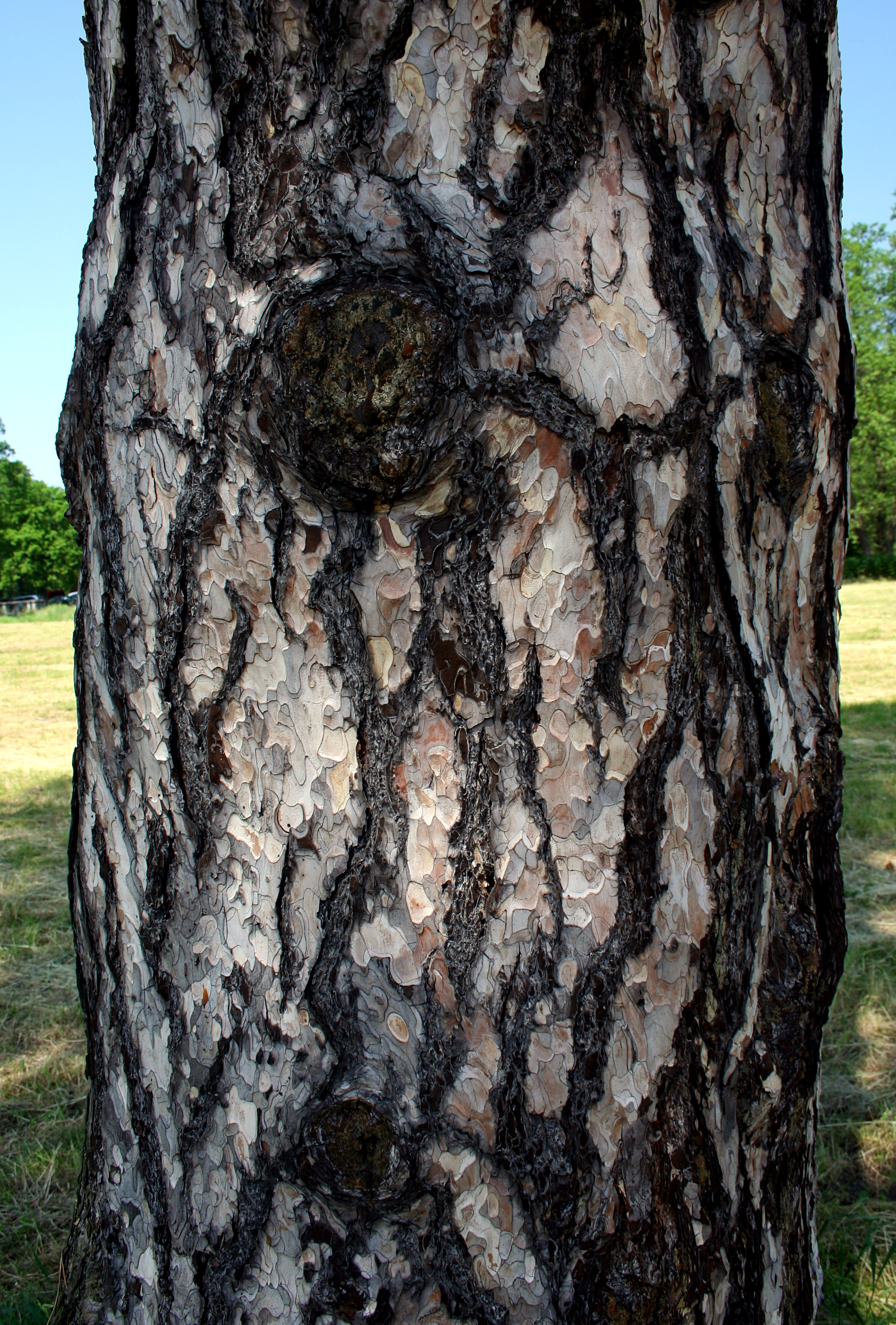 Sosna czarna w parku w Świerklańcu - kora